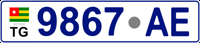 Схематичне зображення номерного знаку